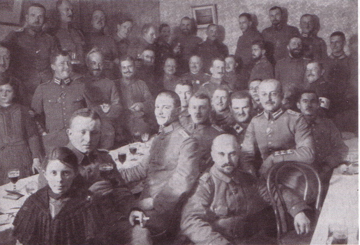 Fotografie von Kösener Corpsstudenten als Soldaten im Ersten Weltkrieg